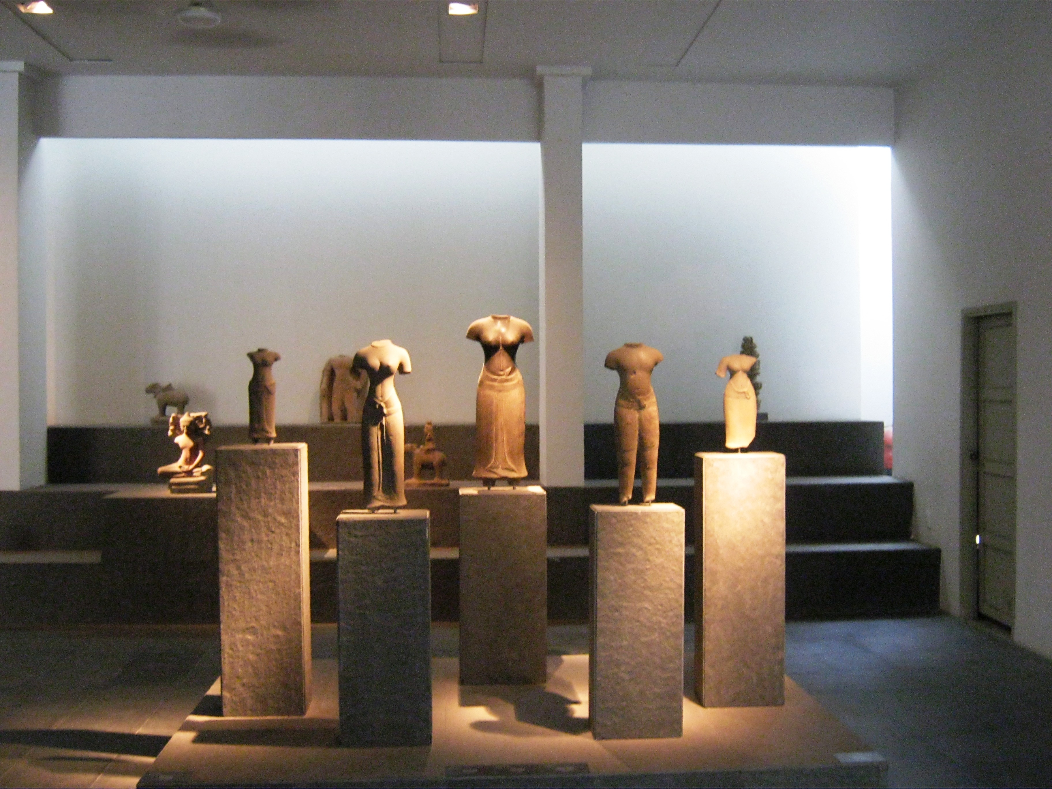 Điêu khắc Chăm: Những tượng đá. Hiện vật cổ đang trưng bày trong Bảo tàng Lịch sử Việt Nam tại TP. Hồ Chí Minh.